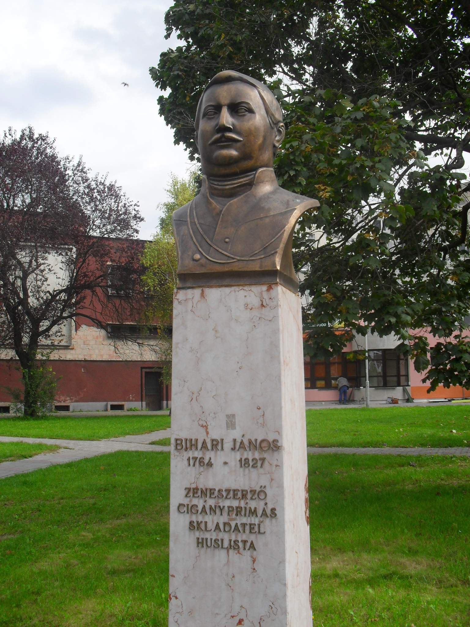 Dunaszerdahely - Bihari János mellszobra